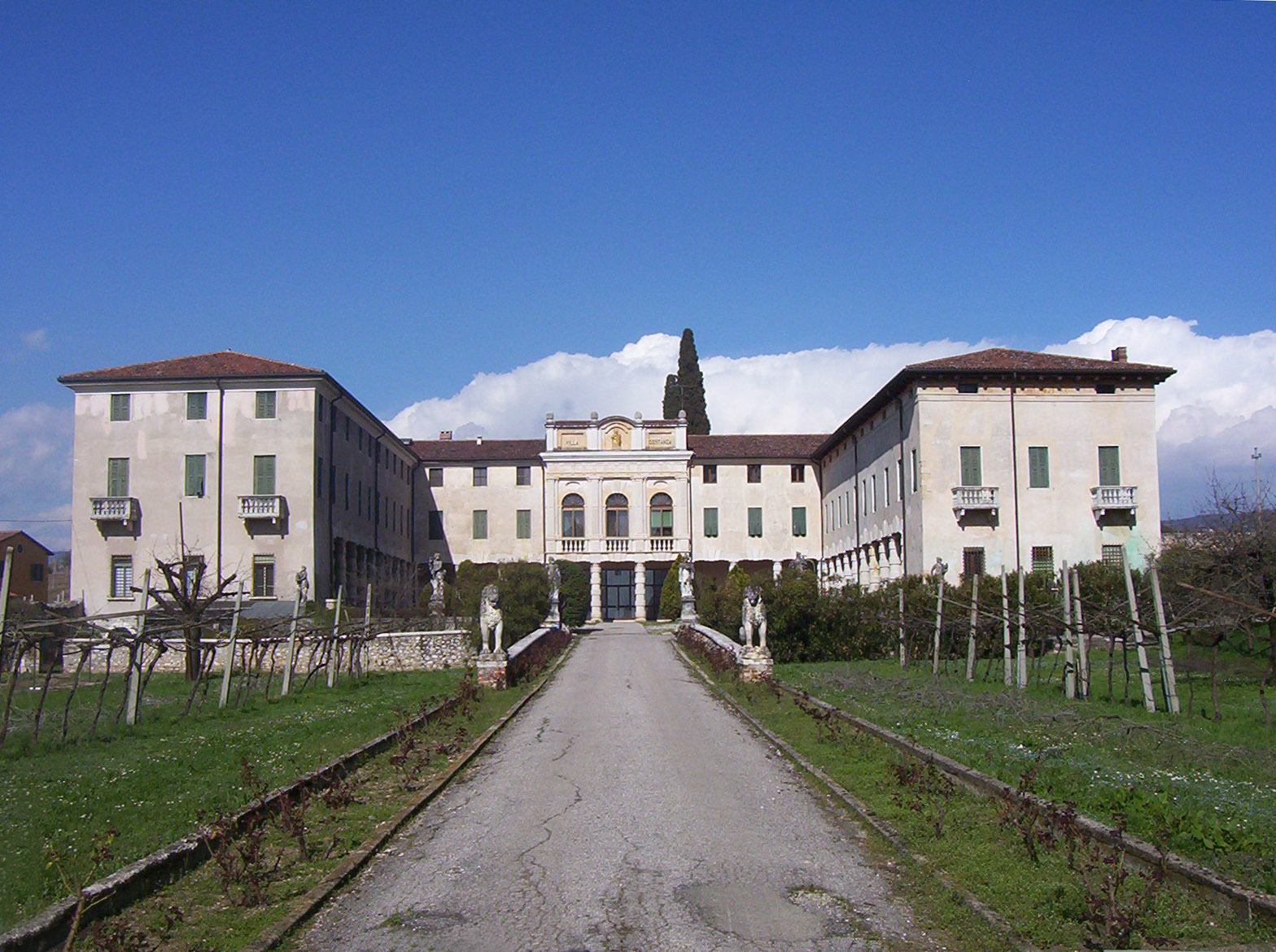 La facciata di villa Monga di San Pietro in Cariano